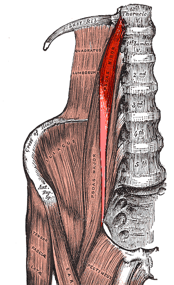 Musculus psoas minor gemarkeerd in File:Gray430.png (gecropt)